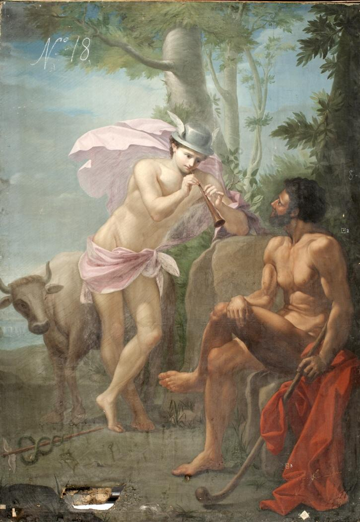 La obra representa a Mercurio junto a Argos.